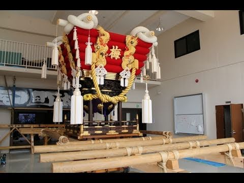 梅町ふとん太鼓